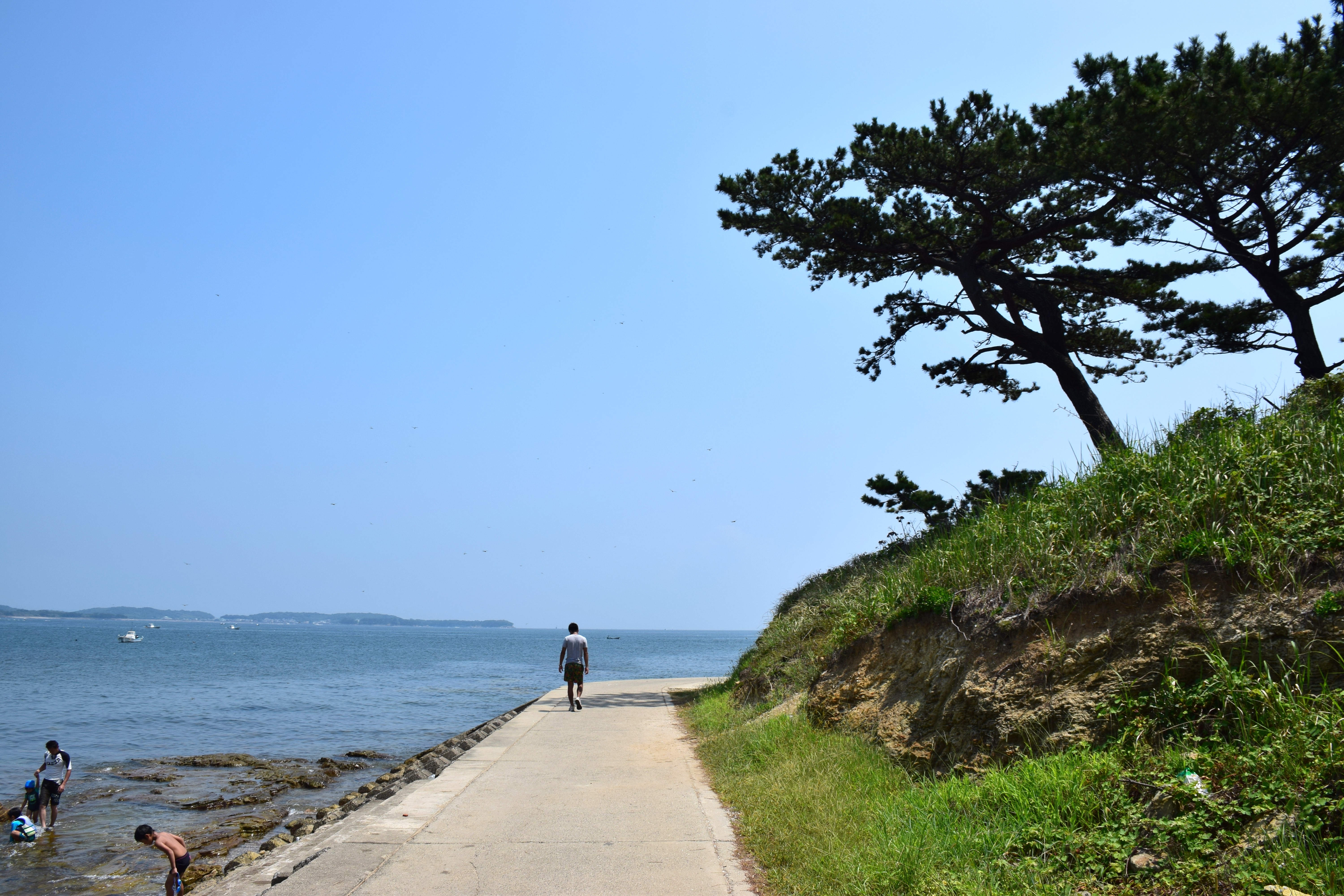 左奥の島は佐久島